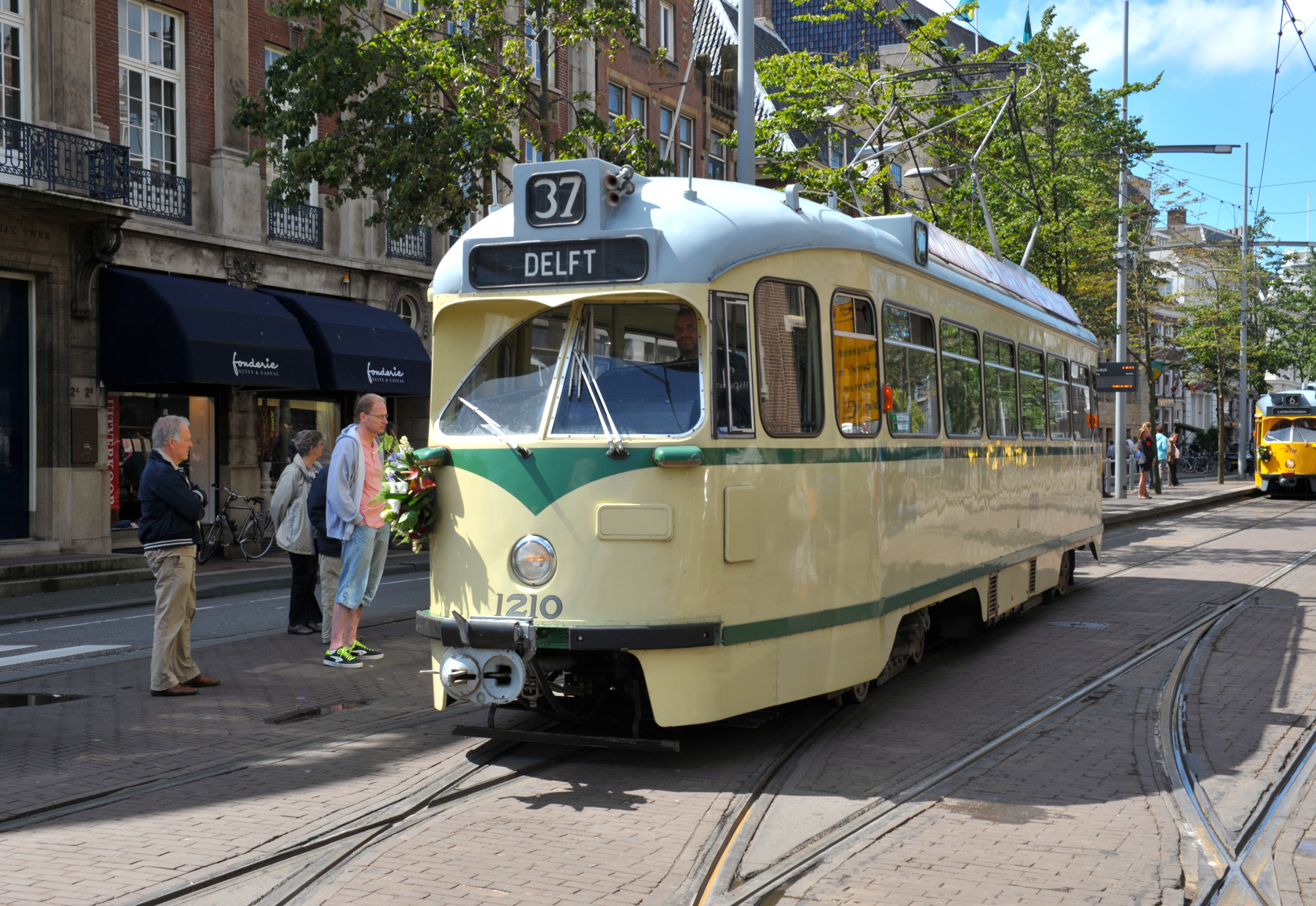 PCC HTM 1210 (1963). In 1963 bouwde de firma La Brugeoise de PCC serie 1201-1240 voor de N.V. Haagsche Tramweg-Maatschapij (HTM). Om ook het laatste oude materieel te kunnen vervangen, bestelde de HTM in 1962 nog eens 40 PCC's. Een groot verschil was dat ze 15 cm breder waren dan hun voorganger. Bron